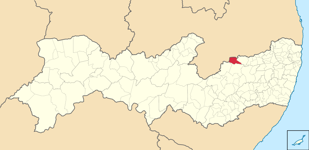 Mapa de Santa Cruz do Capibaribe (2)